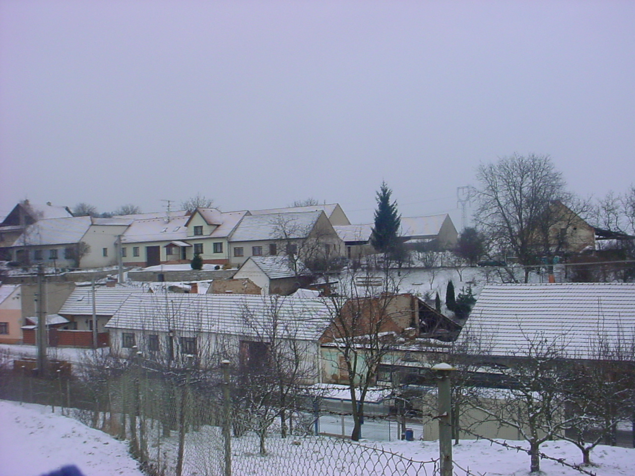 Obec Hvozdec